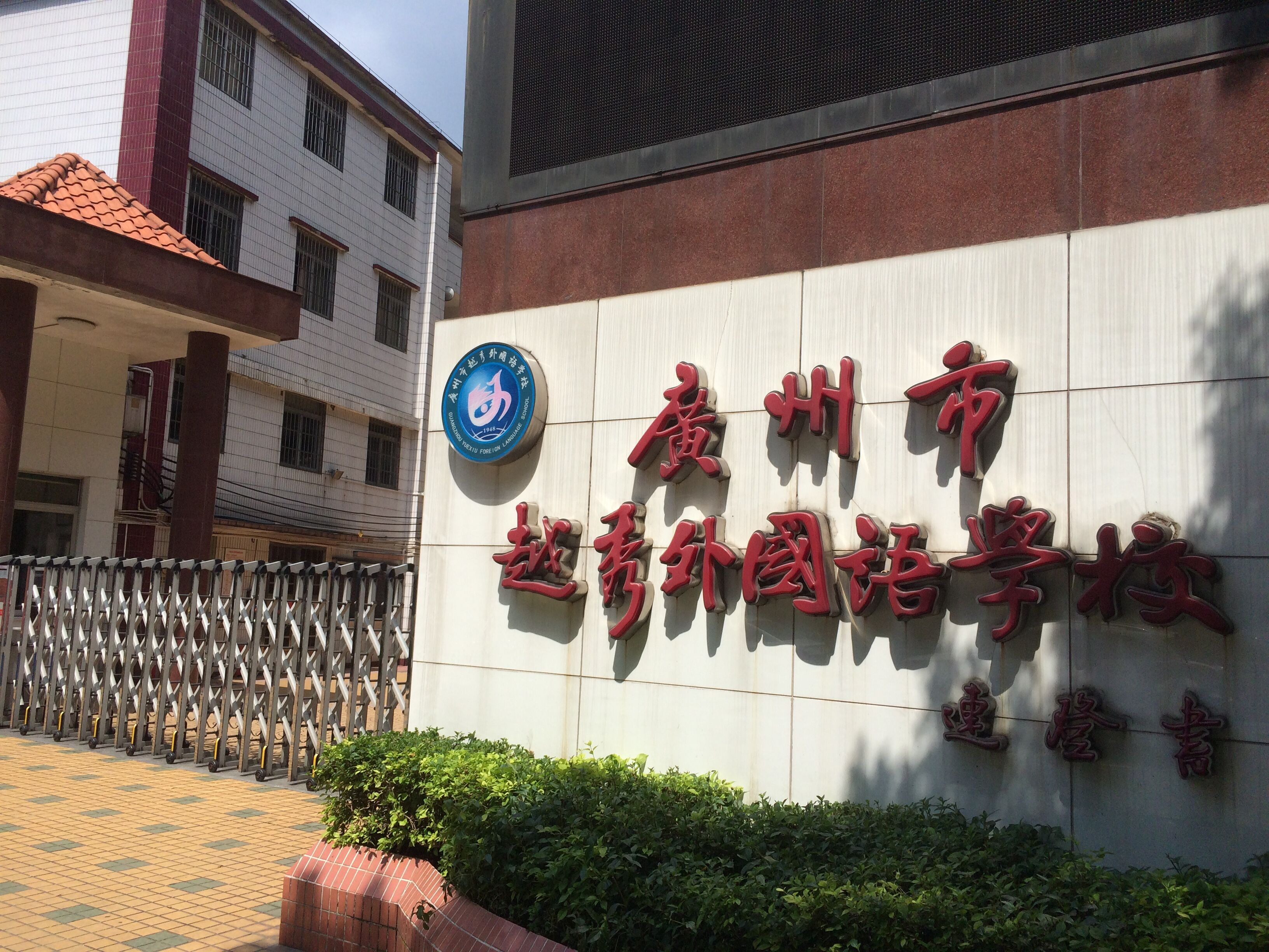 廣州市越秀外國語學校南校區